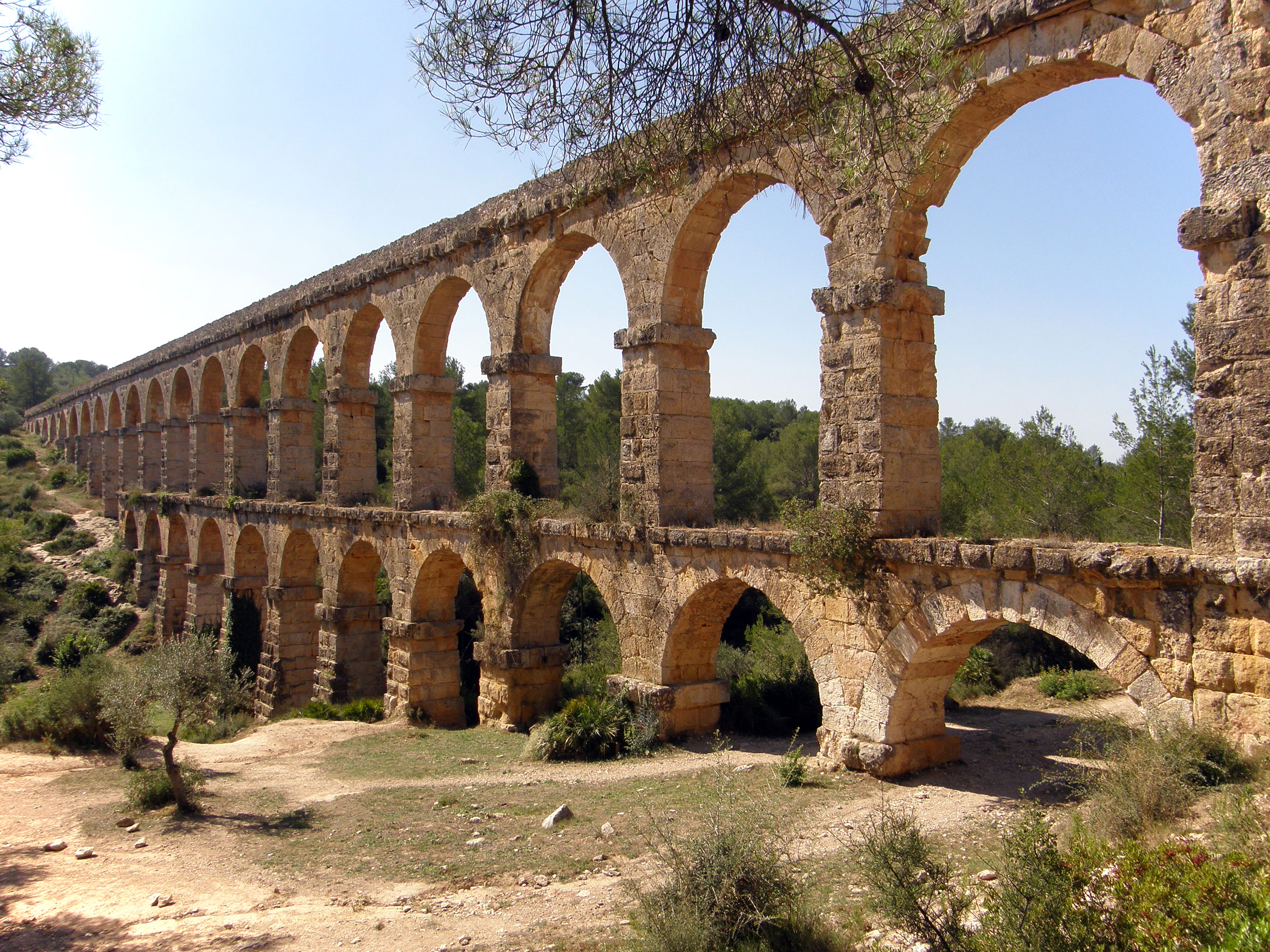 Tarragona Ponte del Diablo